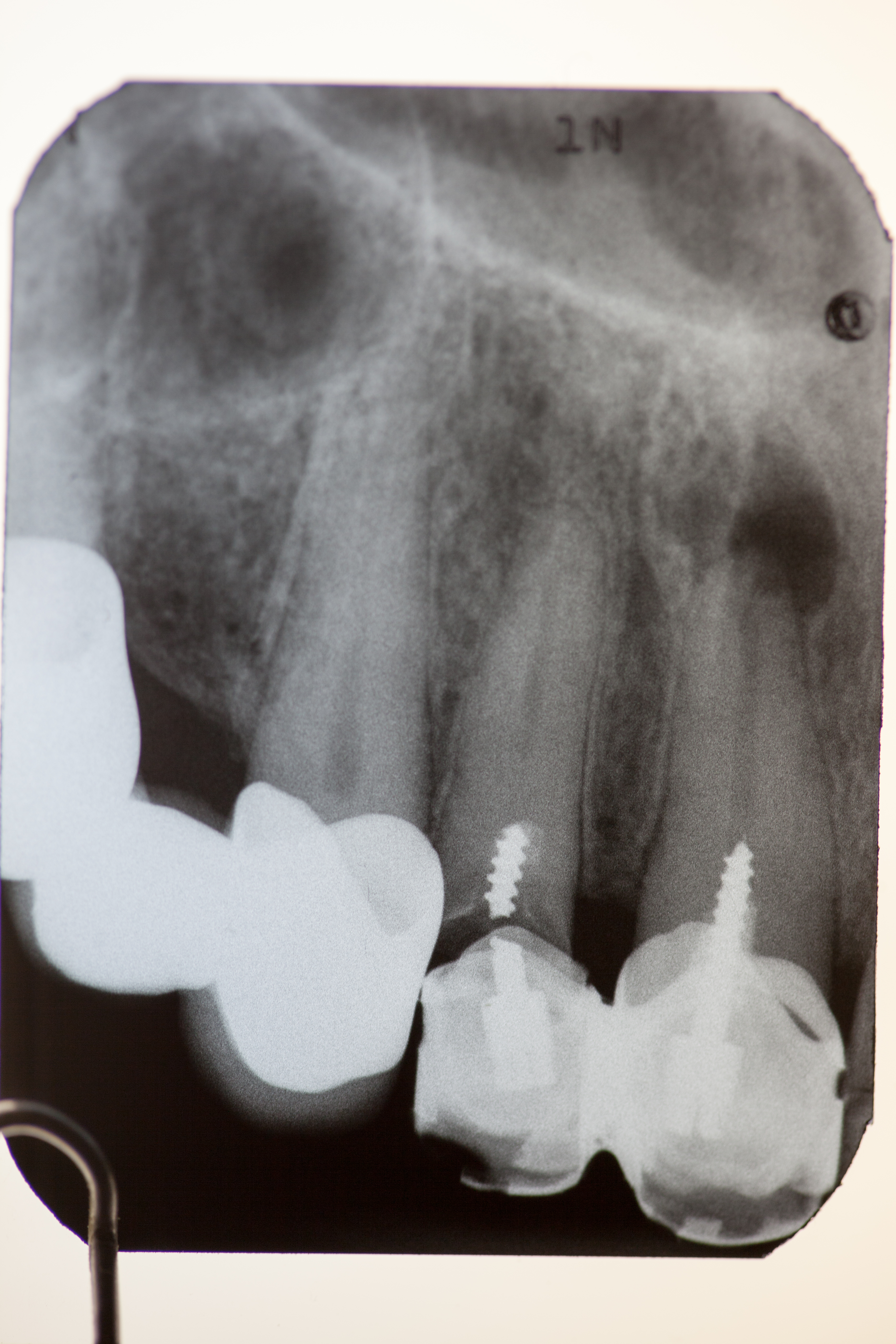 IN Lettland gefertigter Zahnersatz: geschraubter Stumpfaufbau an Zahn 11 und 12, bei Zahn 12 bereits gebrochen. Die Wurzeln von 11 und 12 sind paradoxerweise ohne sichtbare Wurzelfüllung (vielliecht wurden die Pulpen nur devitalisiert und belassen: Mortalamputation) apikale Aufhellung an Zahn 11 (Granulom oder Zyste)